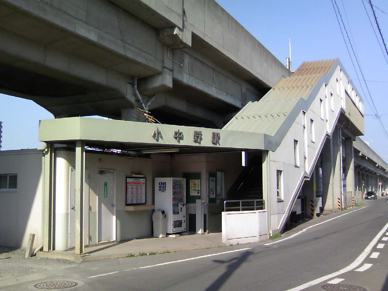 JR八戸線・小中野駅 駅舎(JR KONAKANO STA. - AOMORI, JAPAN)